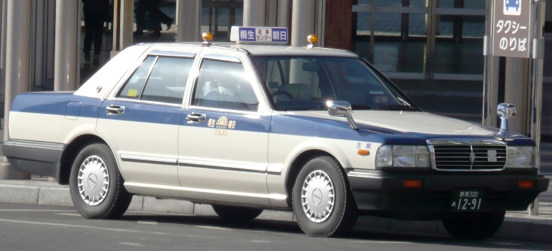 Kiryu Asahi taxi.